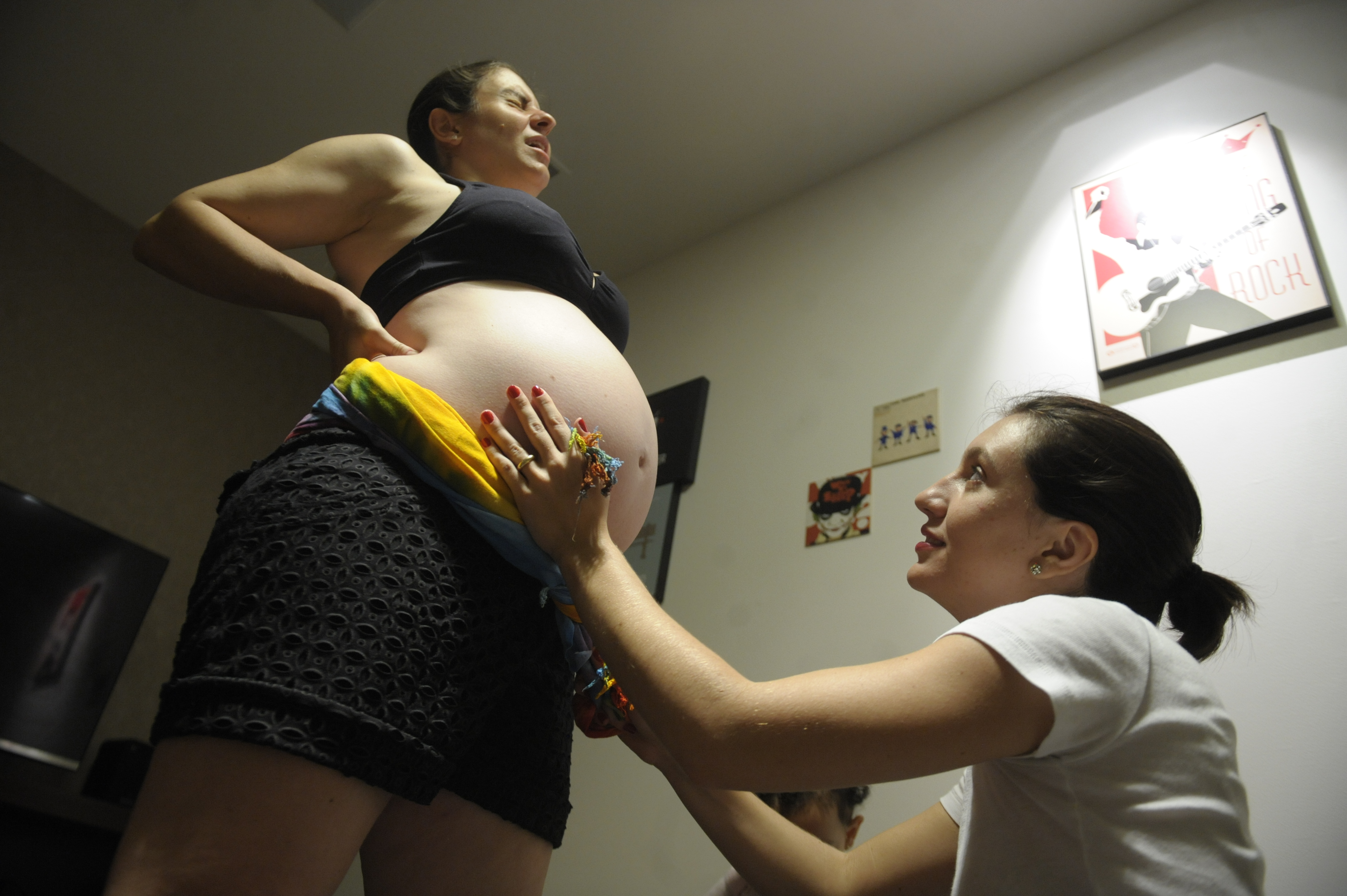 Doulas oferecem orientação, suporte físico e emocional à família na gravidez e no parto. A doula Jéssica Macêdo orienta Luciana Rodovalho sobre posições, exercícios e cuidados que ajudam a gestante a se sentir mais confortável no final da gravidez e aliviam as dores no trabalho de parto, como banho, posição de "cavalinho" e apoio de bola. Foto: Jefferson Rudy/Agência Senado